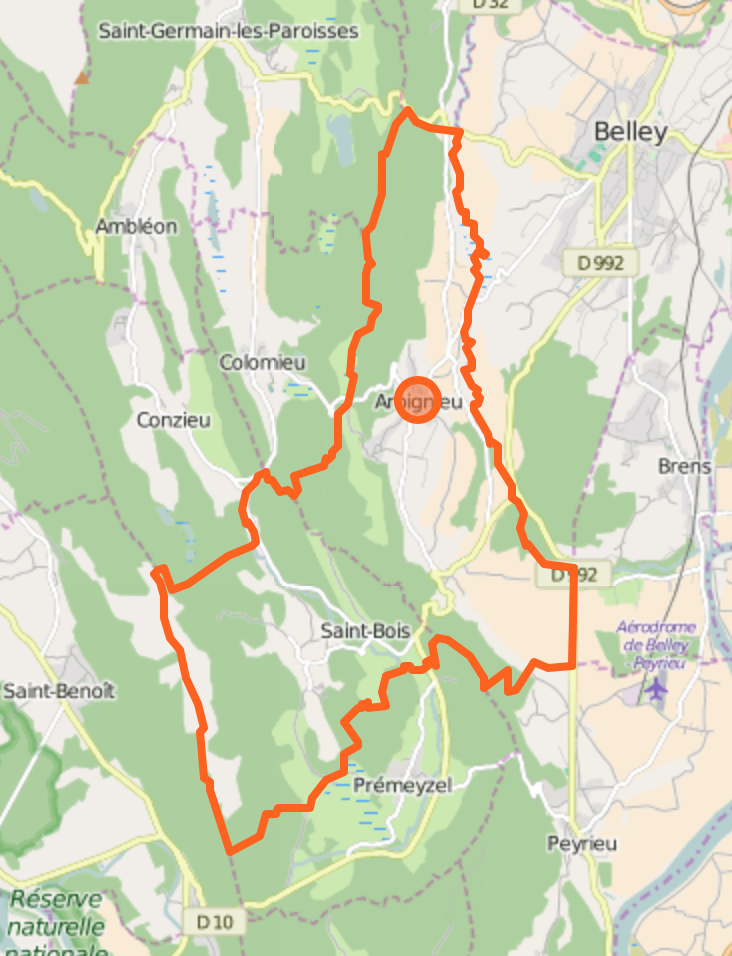 Limite de la commune nouvelle d'Arboys-en-Bugey